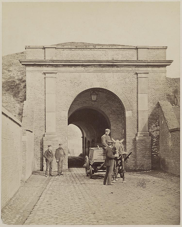 De foto is van het exterieur van de Oosterpoort te Groningen anno 1875. Nadere achtergrondinformatie omtrent de foto is te vinden op het weblog Gelkinghe van de Groninger historicus Harry Perton.